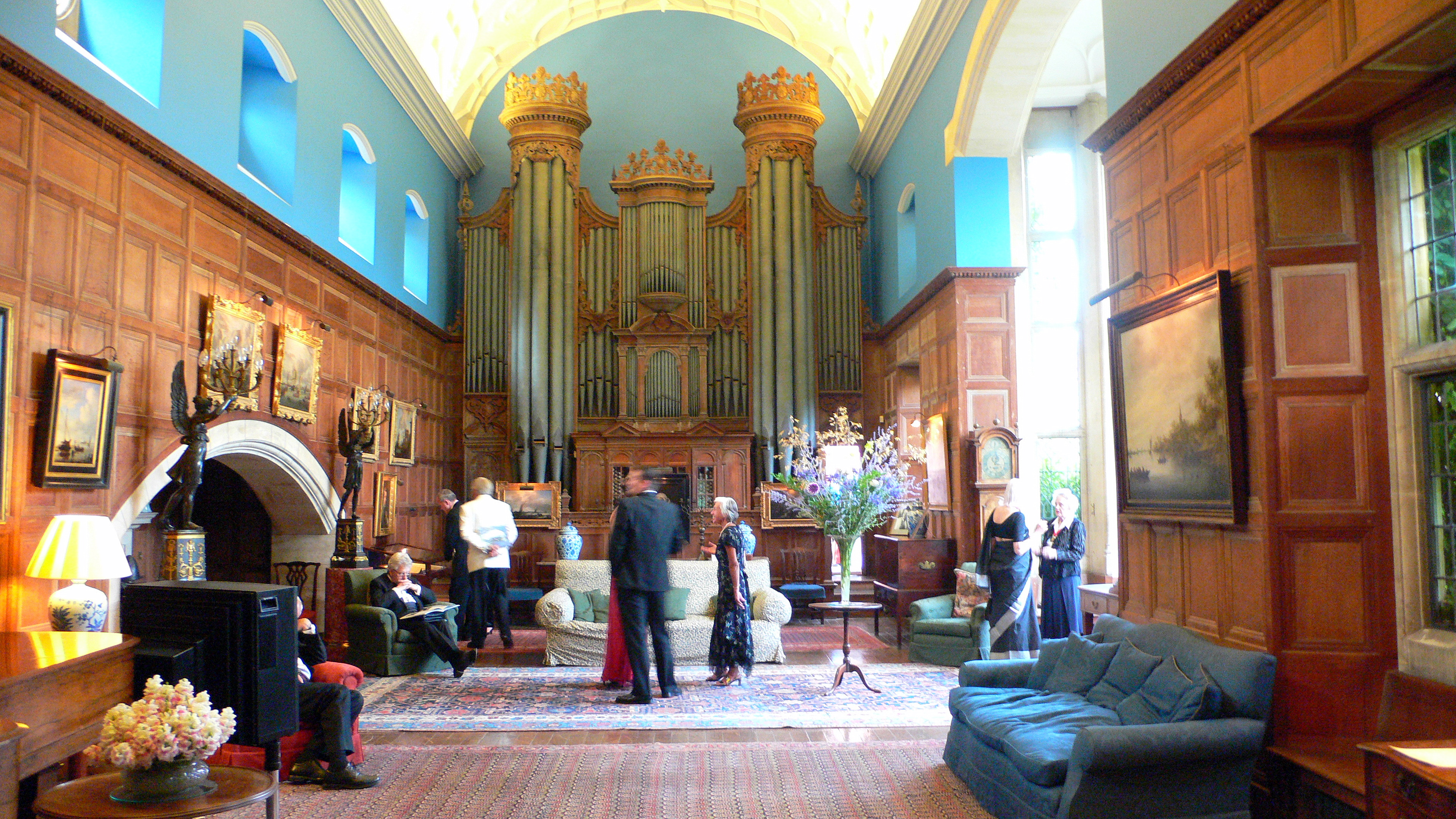 Organ inside Glyndebourne HouseGlyndebourne